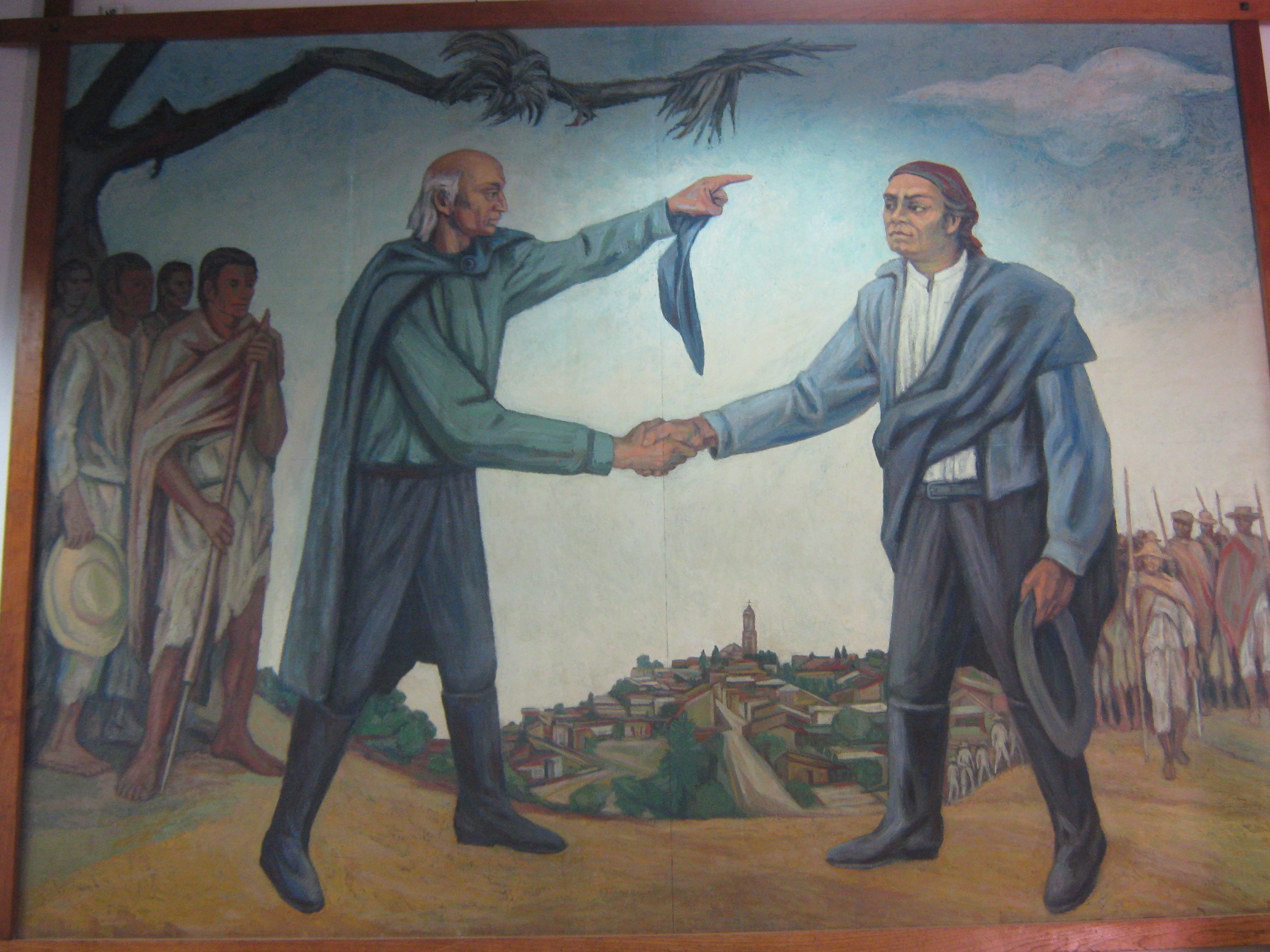 Murales en el Museo Casa de Morelos